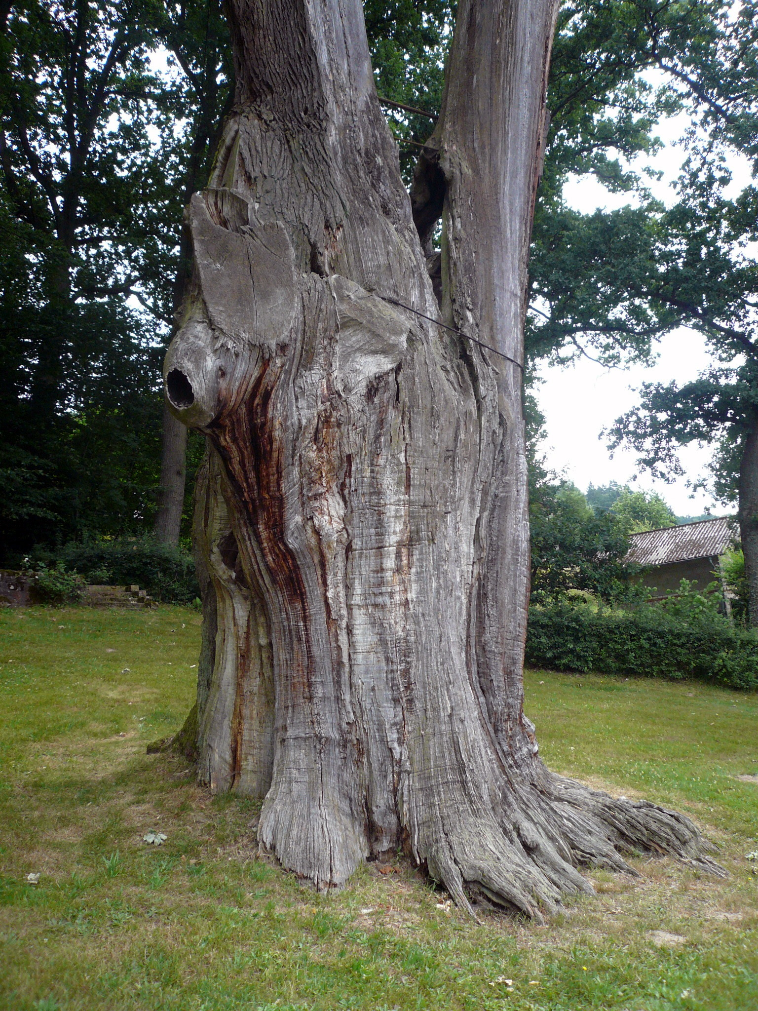 Dicke Eiche bei Airlenbach